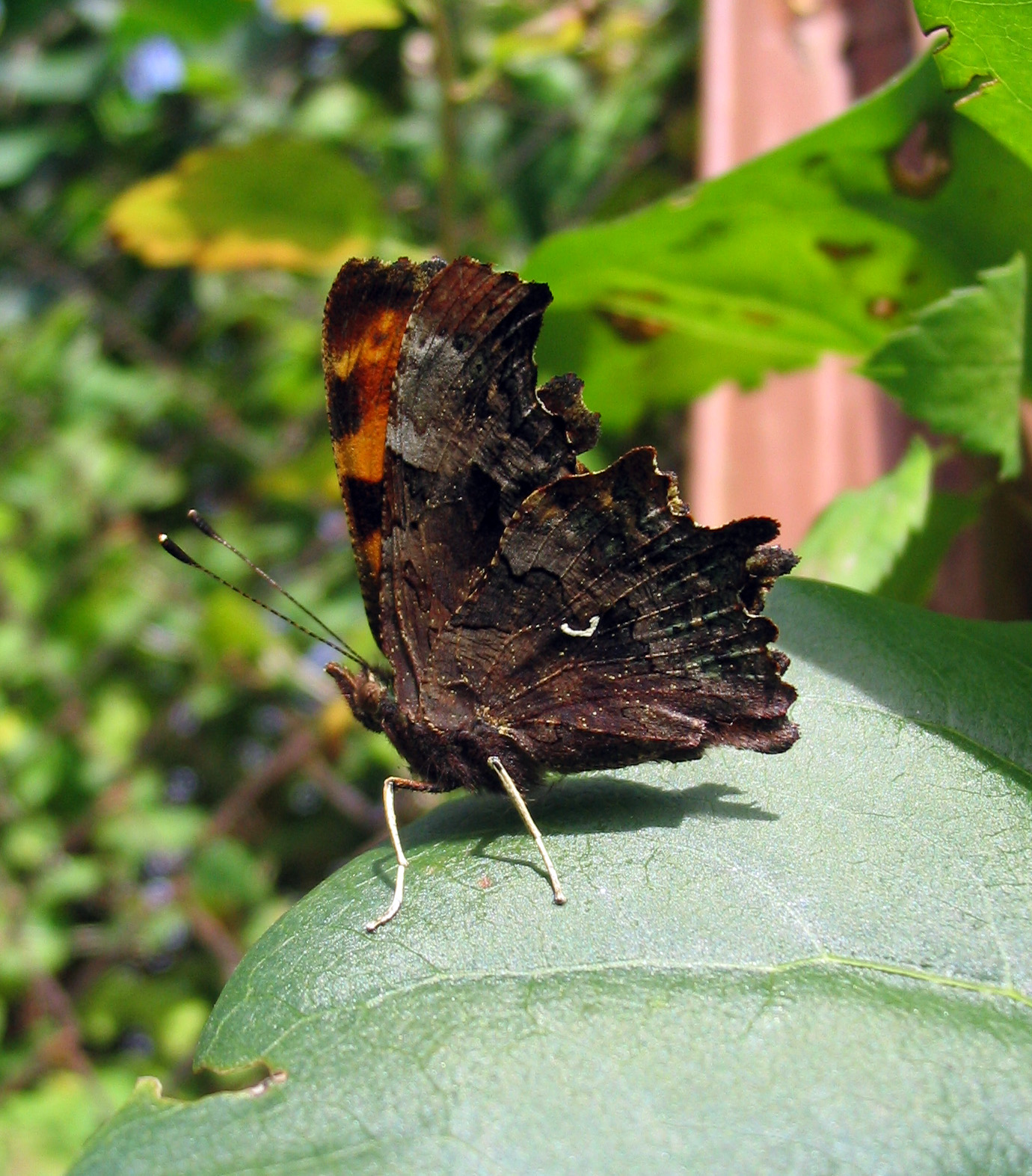 Beschreibung: C-Falter (Polygonia C-album) gut zu erkennen ist das namensgebende weiße C, das sich an den Unterseiten der Hinterflügel befindet Fotograf: Darkone